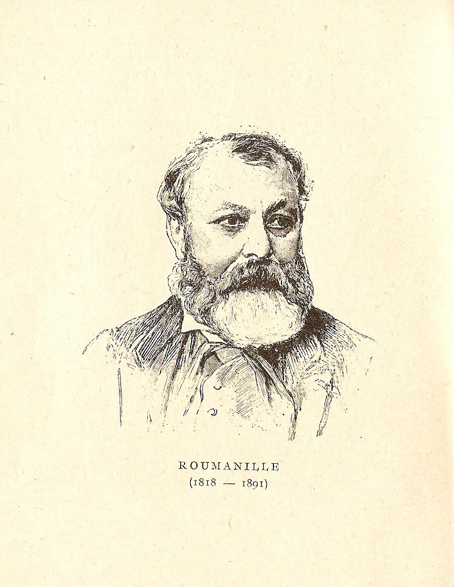 Portrait de Joseph Roumanille